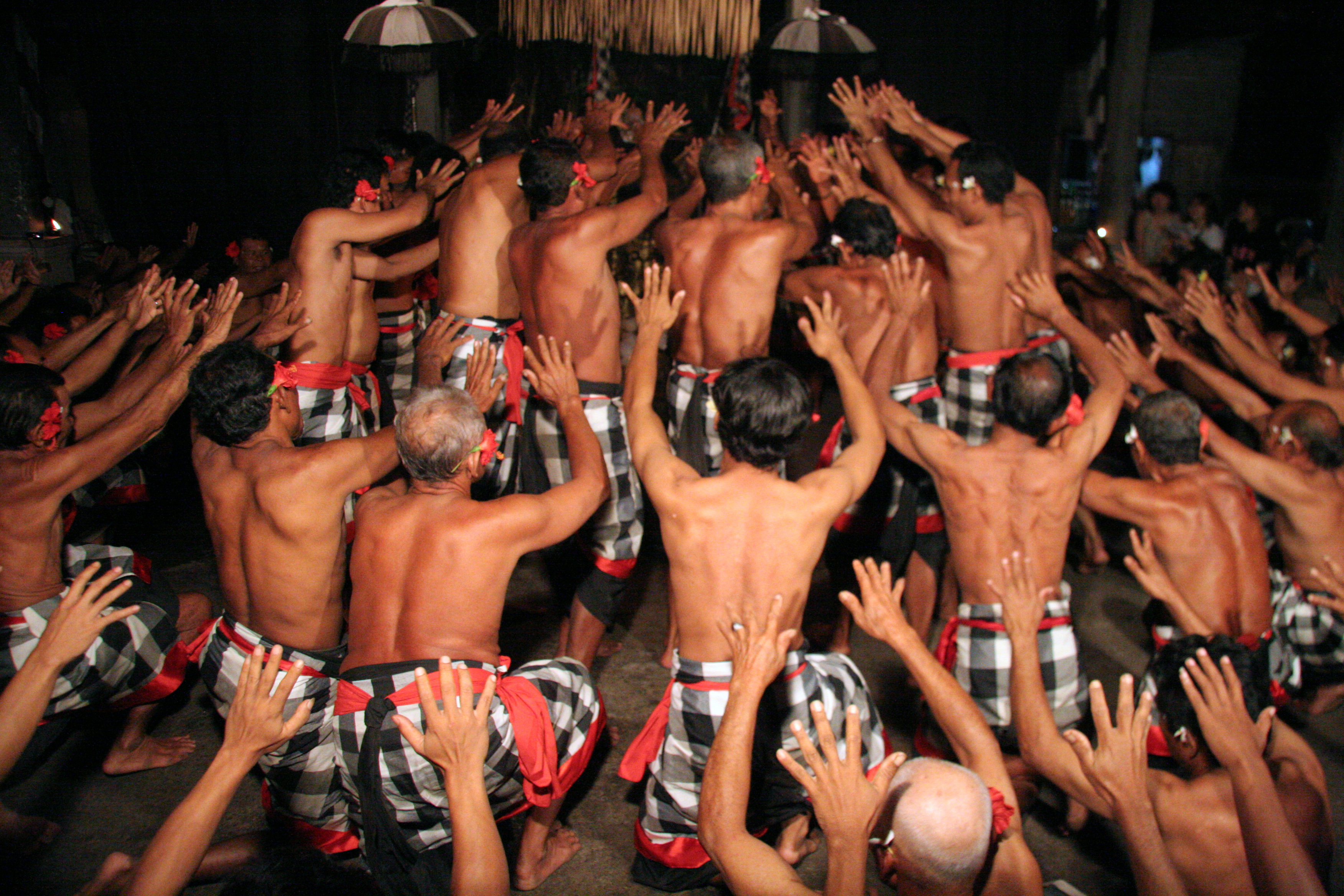 Bali ubud danse du Kesak